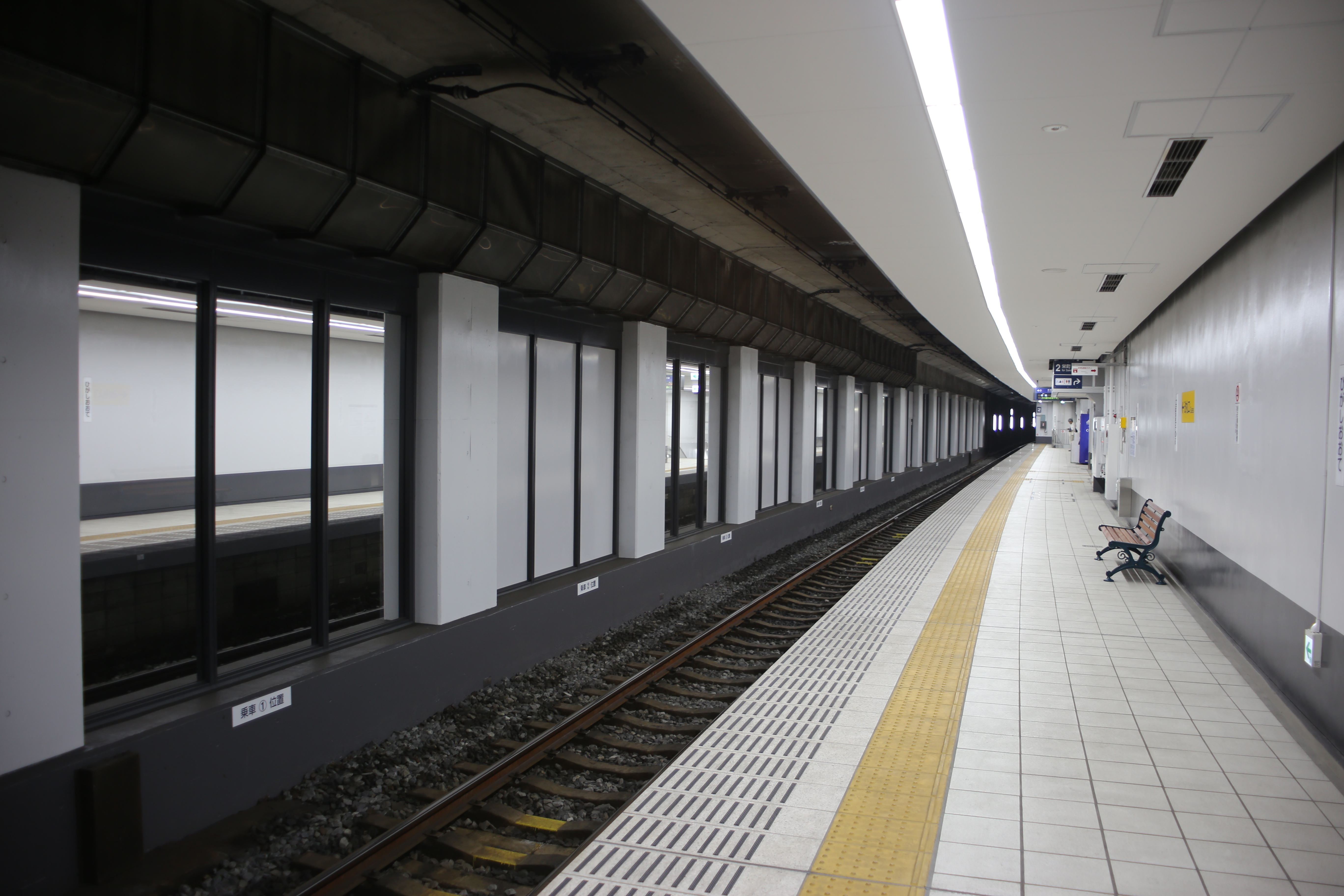 名鉄瀬戸線東大手駅